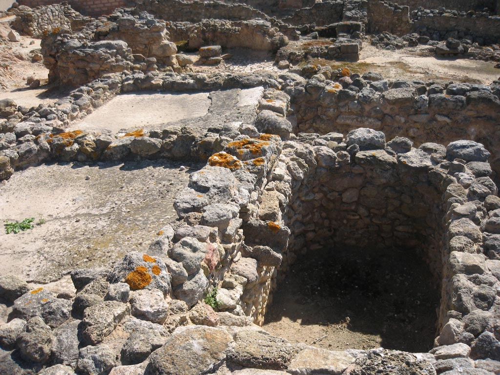 Lagar del siglo IV-III a.C. en el Ciudad fenicia del Castillo de Doña Blanca en El Puerto de Santa María